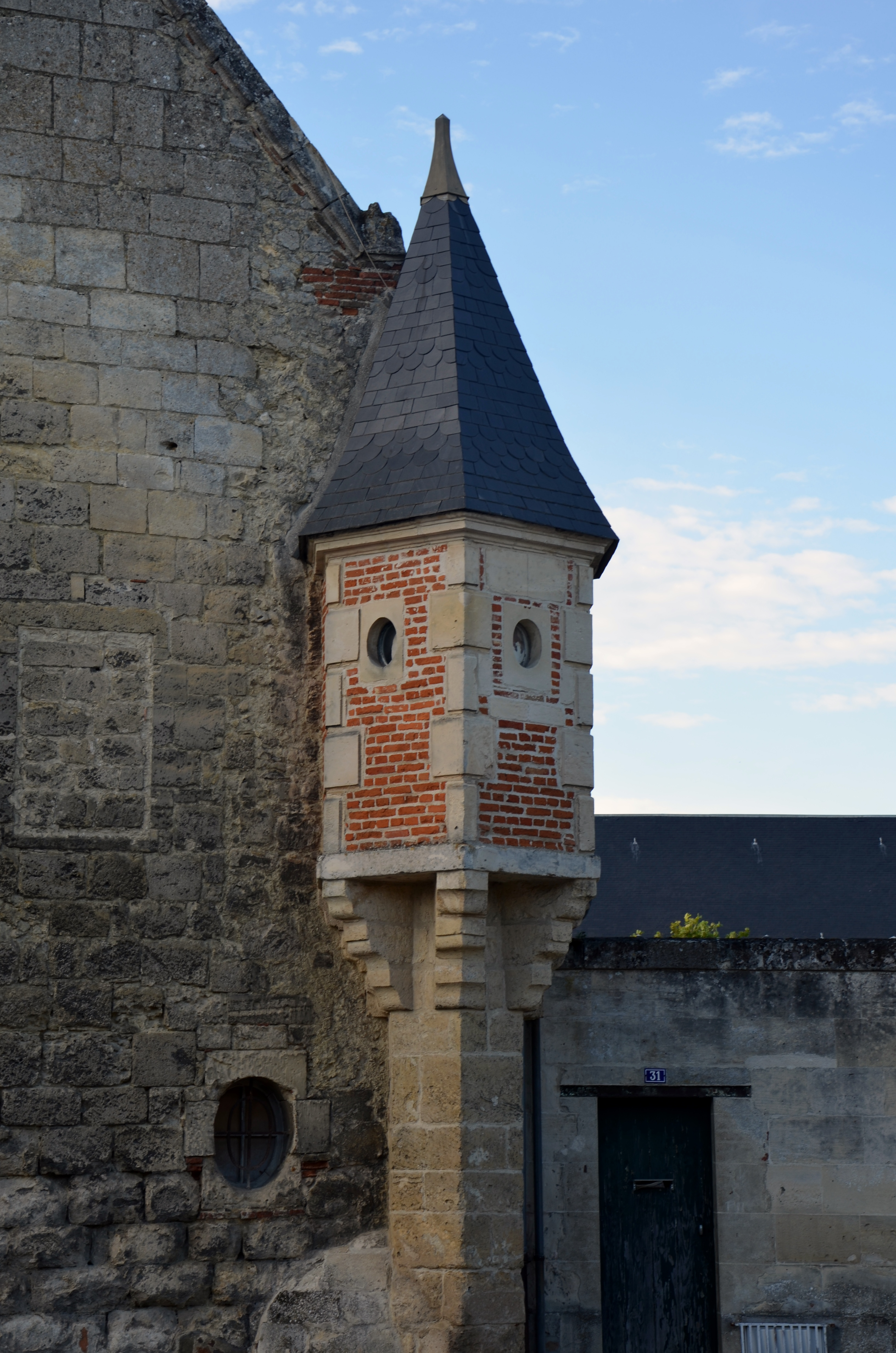 Tourelle abbaye Saint-Martin à Laon (Aisne, France) .